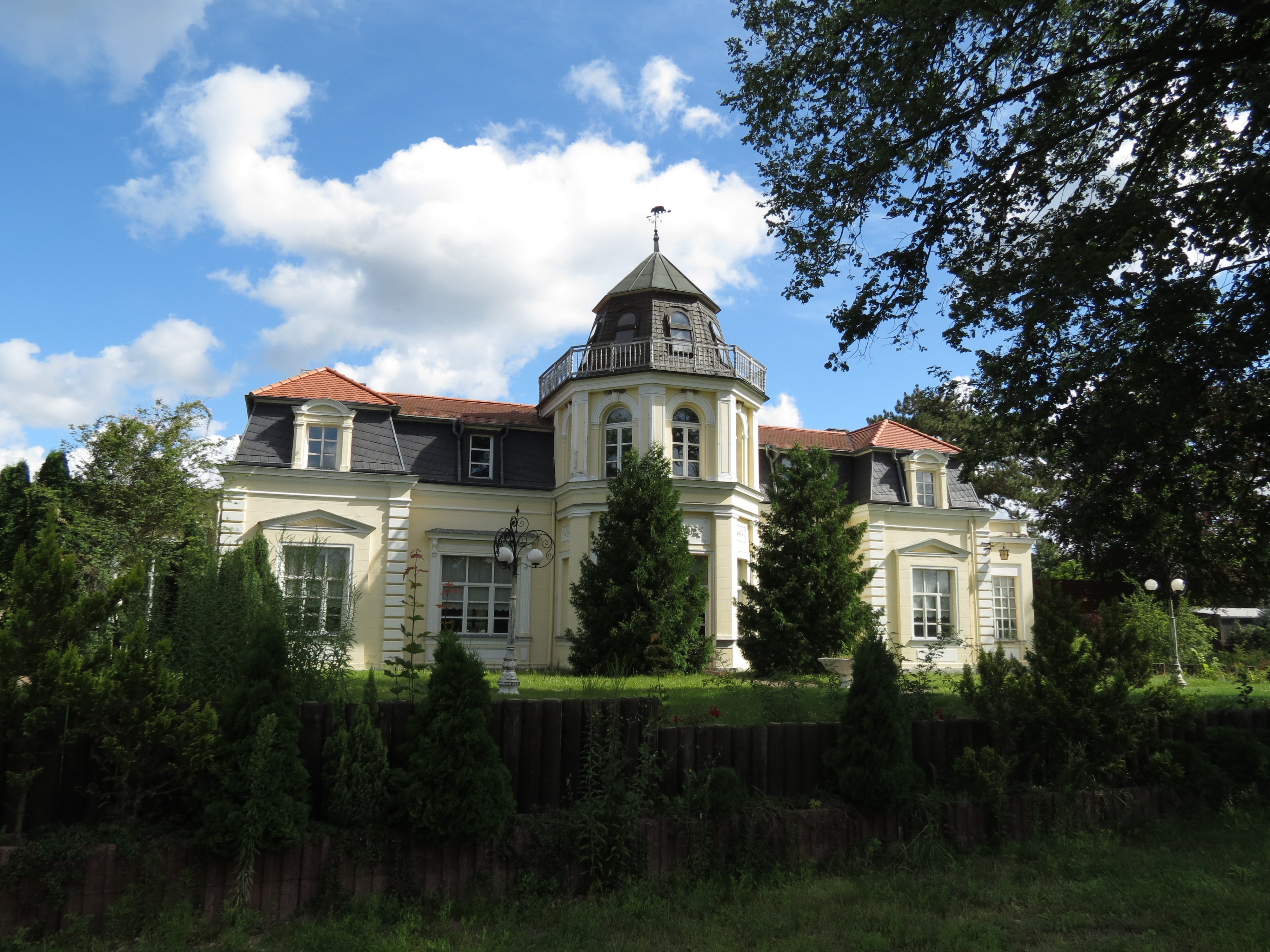 Gutshaus Neuhof, Westseite, Neuhof, Gemeindeteil der Stadt Zossen, Brandenburg, Deutschland